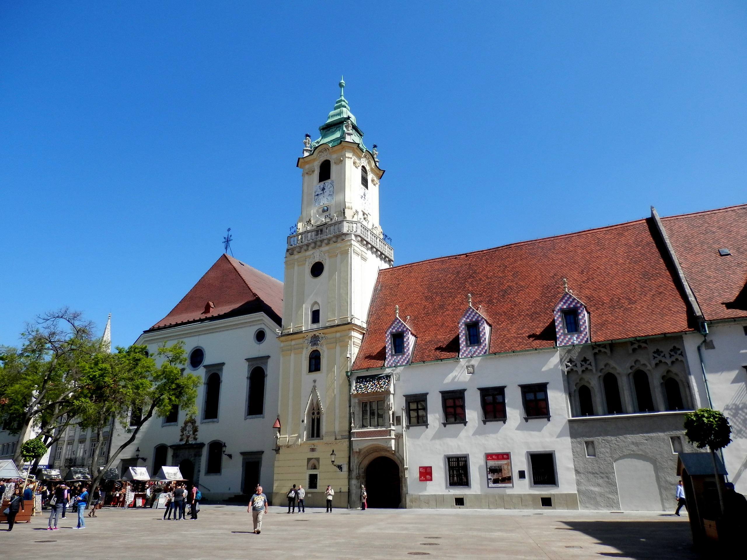 Stará radnica, Hlavné námestie, Bratislava.Vľavo od veže je Jezuitský kostol